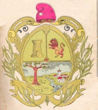 Escudo de la villa de San Antonio de los Baños